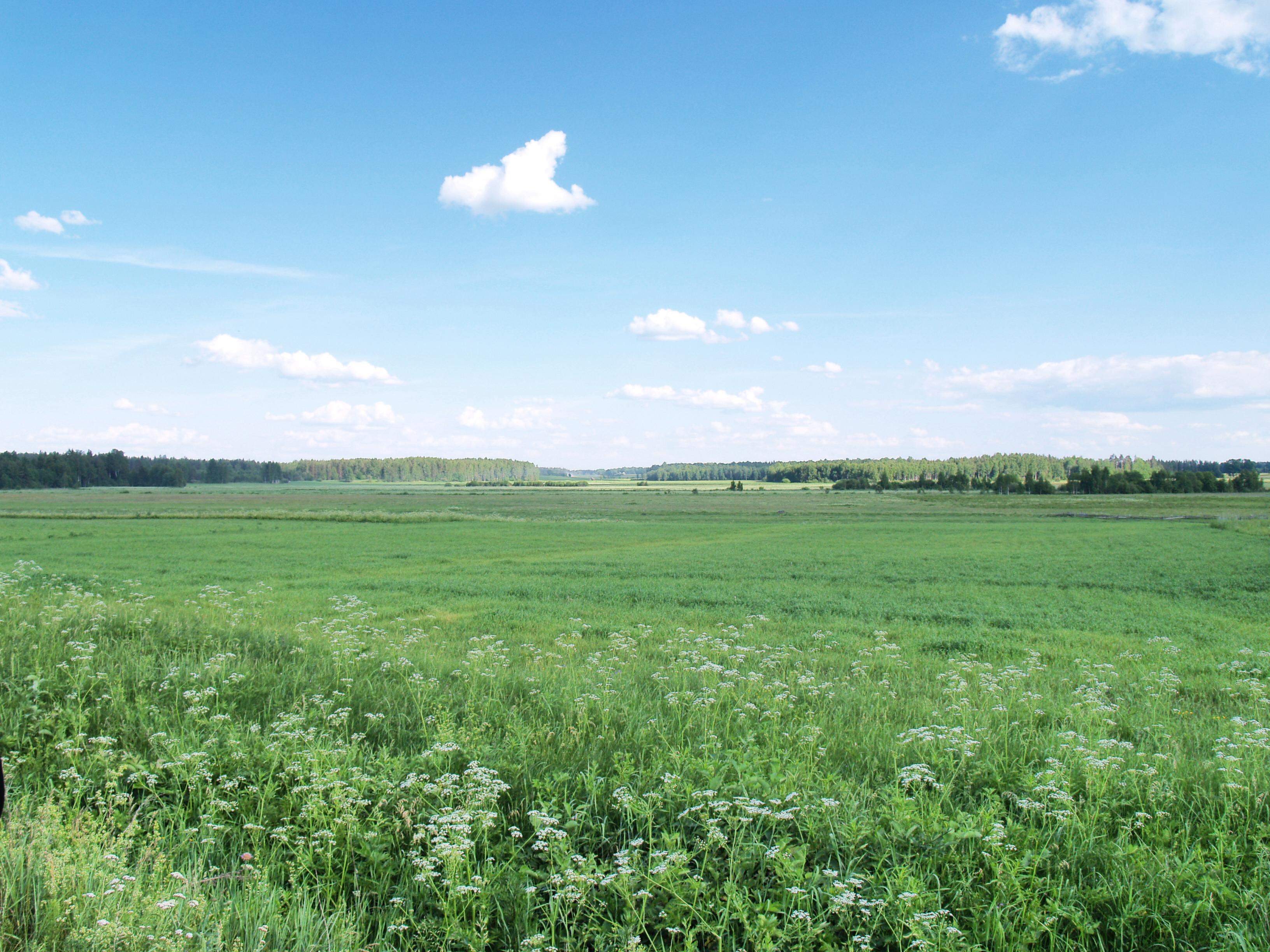 Lobērģu pļavas (Lobergu meadowy)